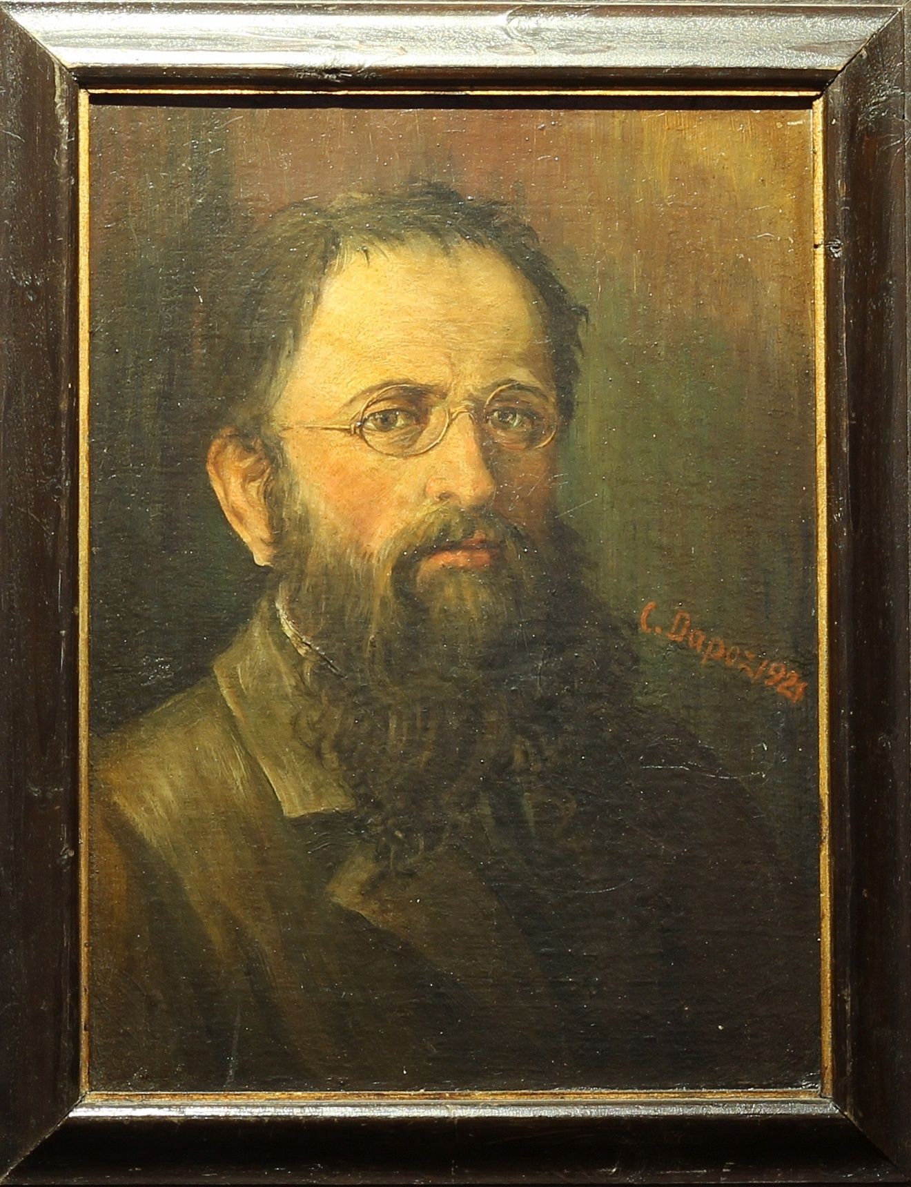 Selbstportrait Cassian Dapoz im Meraner Stadtmuseum